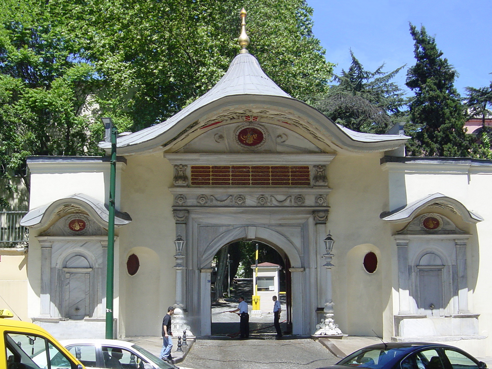 La Sublime porta (Bab-ı Ali) ad Istanbul. Era il portone che conduceva al quartier generale del gran visir, dove il sultano teneva la cerimonia di benvenuto per gli ambasciatori stranieri. Nel linguaggio diplomatico il suo nome era passato a indicare il governo ottomano stesso. Foto di: Giovanni Dall'Orto, 25-5-2006.